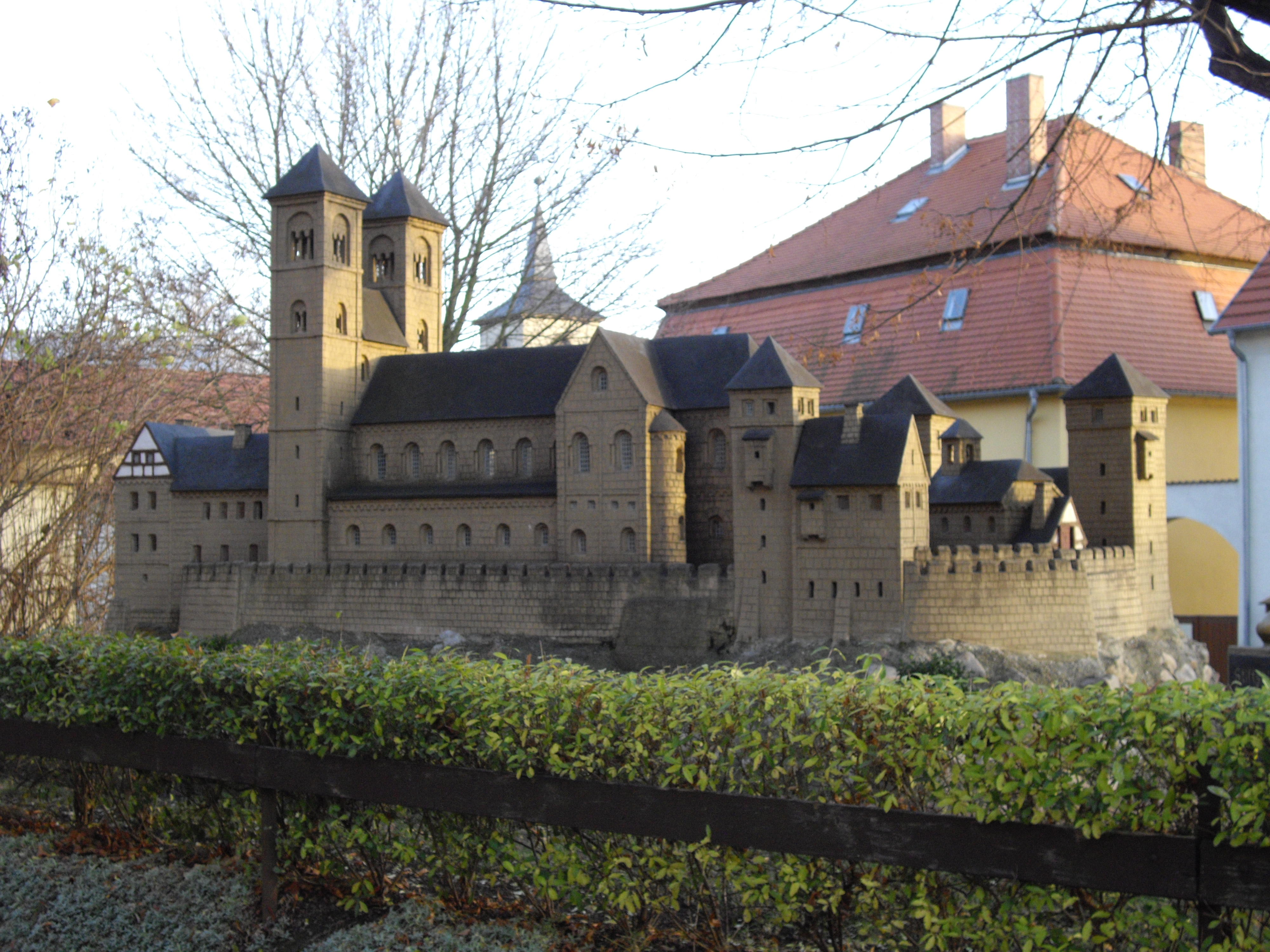 Burg Quedlinburg als Miniaturversion in Gerbstedt